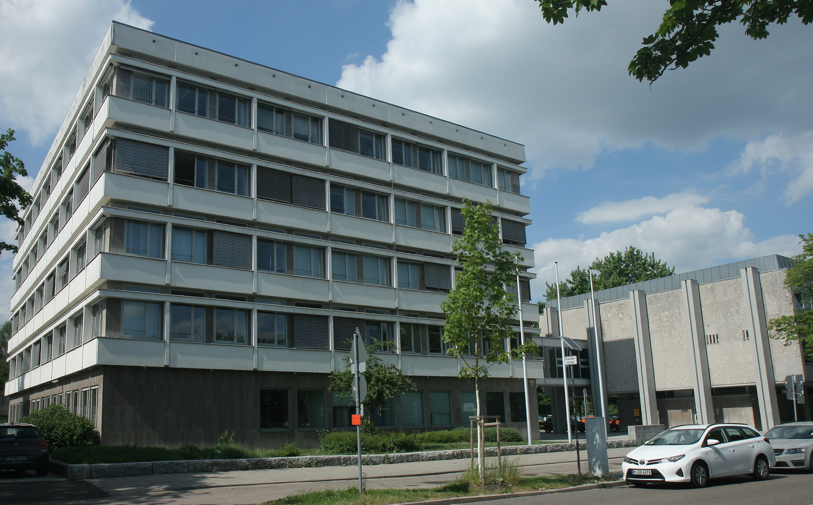 Gebäude des Landgerichts und der Staatsanwaltschaft Ingolstadt, Auf der Schanz 37 in Ingolstadt.